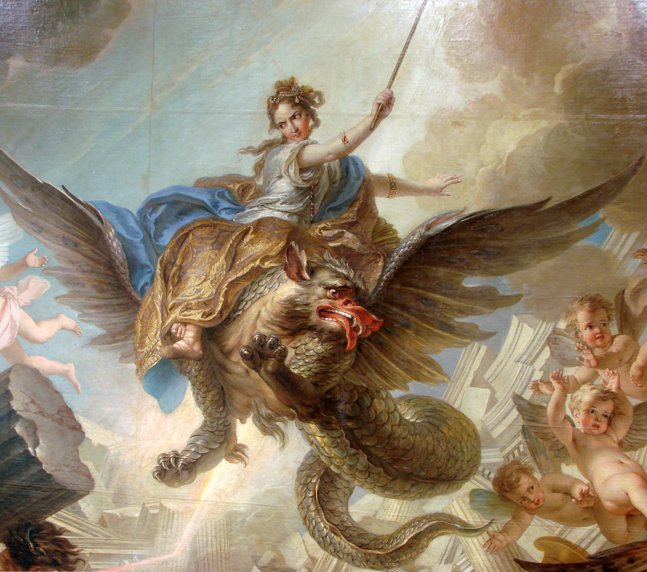 La Destruction du palais d'Armide ( détail ), par Charles-Antoine Coypel, huile sur toile, 1737. Carton de tapisserie pour la tenture des "Fragments d'opéras", commandé par la Manufacture des Gobelins en 1733, et inspiré par l'Armide de Quinault et Lully. Musée des Beaux-Arts de Nancy.